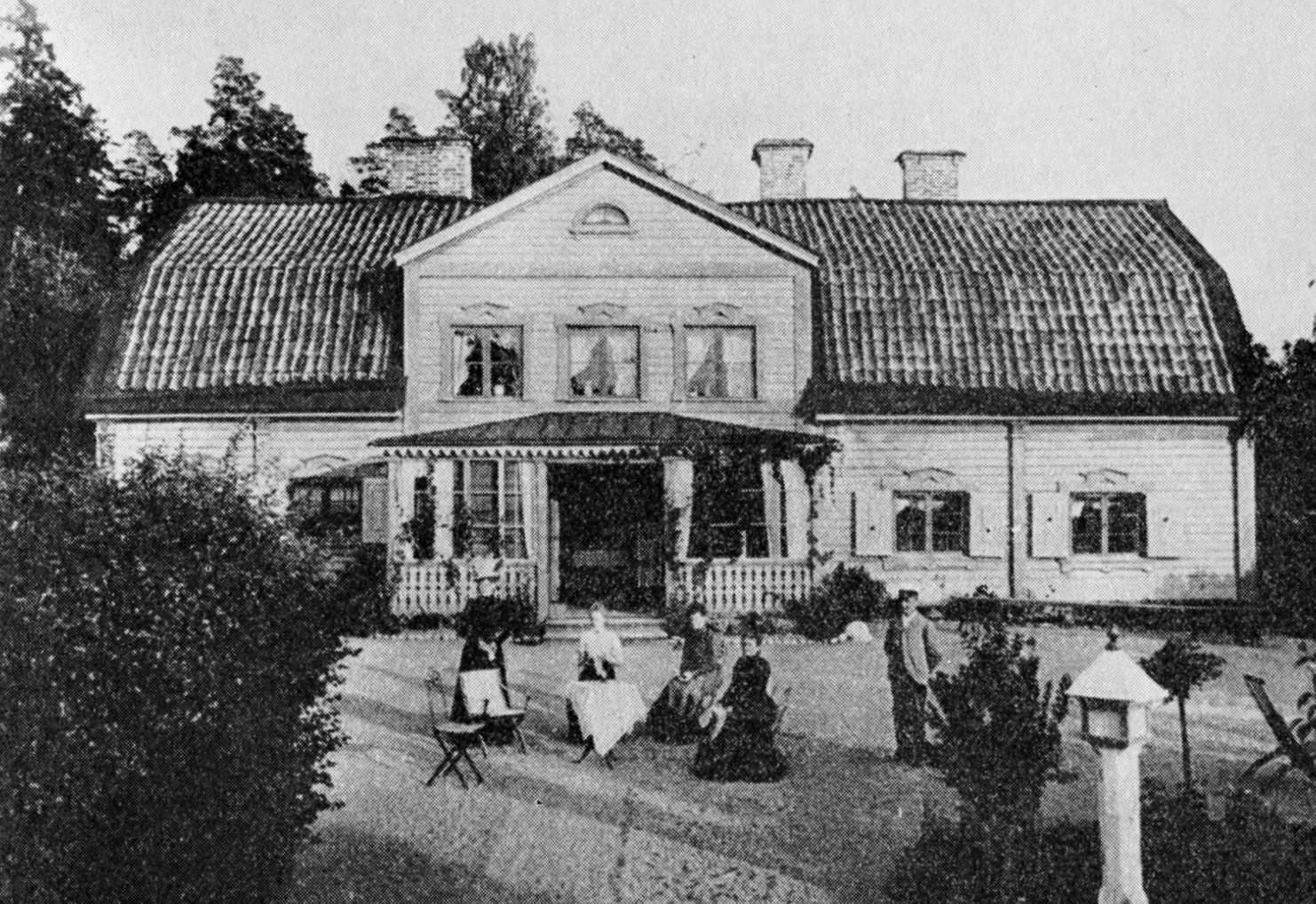 Långängens gård i Långängen, Stocksund